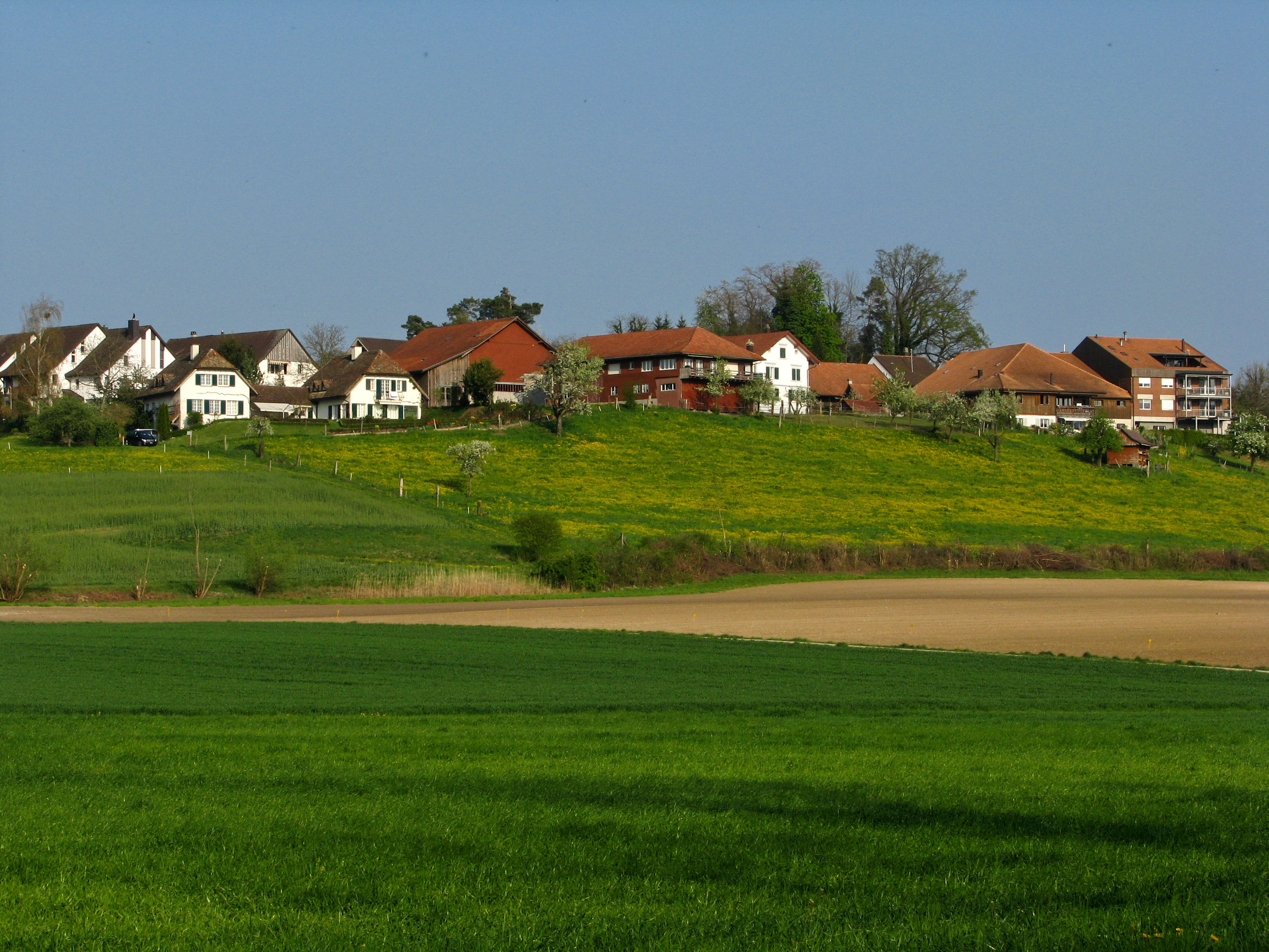 Greifensee (ZH)